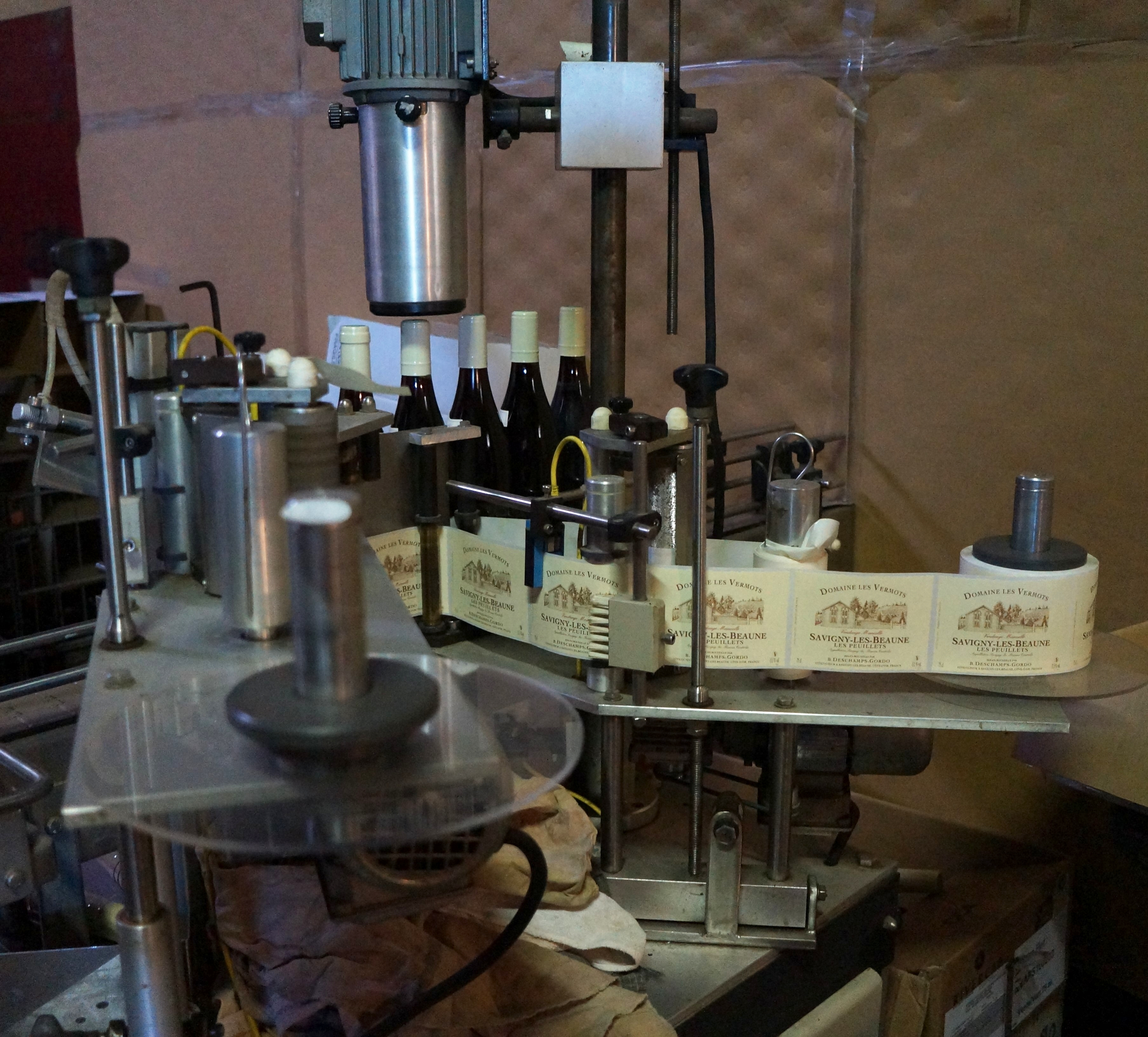 Domaine "Les Vermots" AOC Savigny-lès-Beaune Côte-d'Or Bourgogne-Franche-Comté